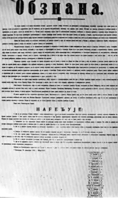 Srpskohrvatski / српскохрватски: Obznana je dekret kojim je vlada Kraljevine Srba, Hrvata i Slovenaca 30. prosinca 1920. godine zabranila rad Komunističke partije Jugoslavije i prokomunističkih sindikata, te suspendovala razna radnička i ustavna prava.